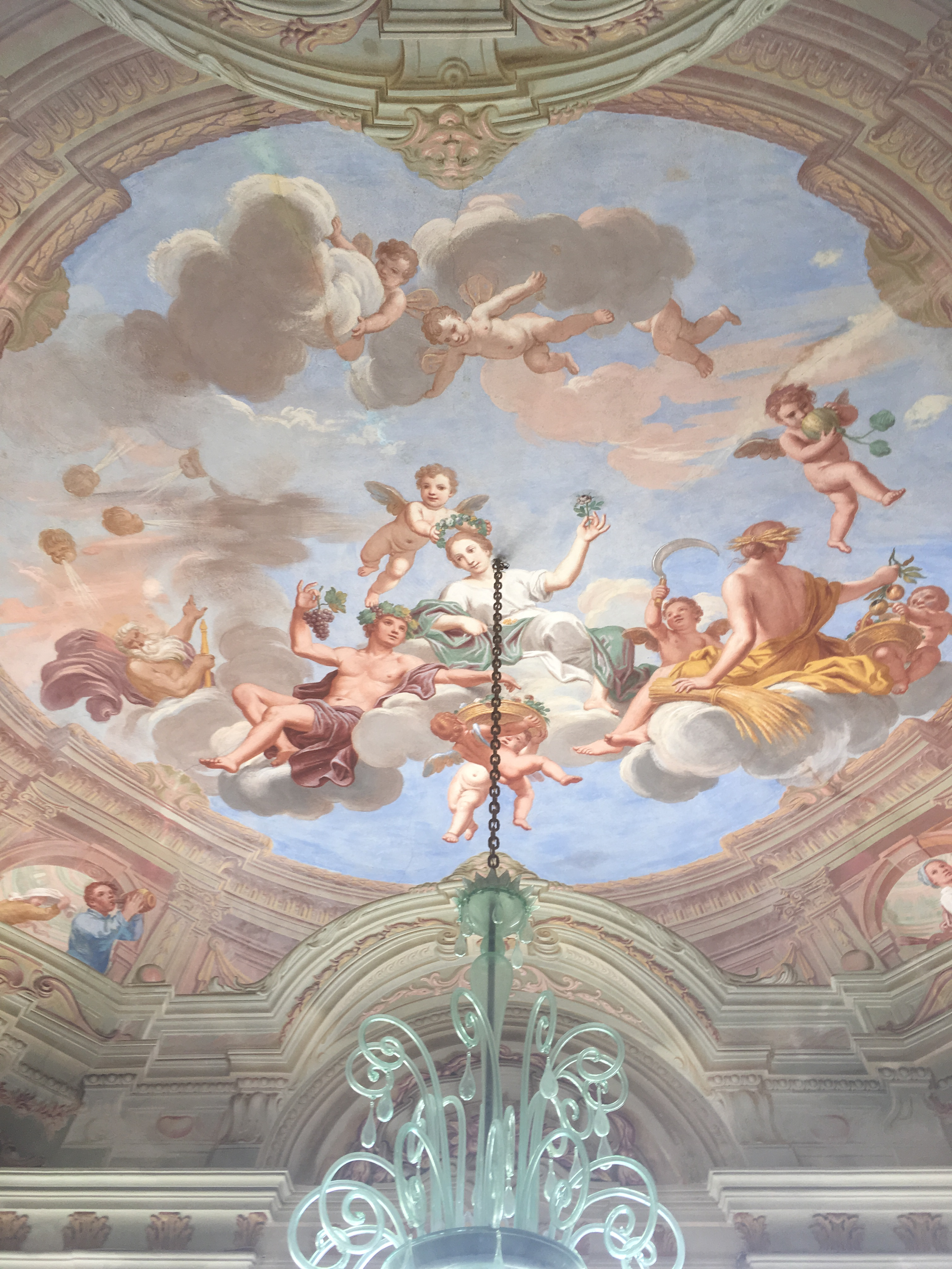 Affresco al piano nobile